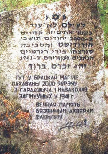 Памятник убитым евреям во время Холокоста в городском посёлке Городище Барановичского района Брестской области.